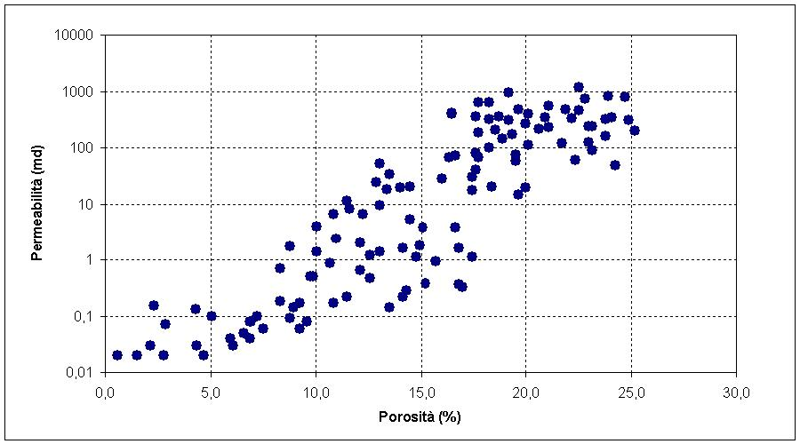 Esempio di relazione tra porosità e permeabilità. Realizzato da me.